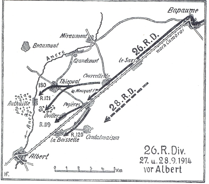 Karte Seite 26: Die 26. (Württ.) und 28. deutsche Reserve-Division Ende September 1914. 26. R.D. mit Inf.-Regt. 180, Res.-Inf.-Regt. 119 und Res.-Inf.-Regt. 121